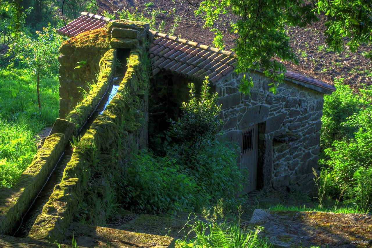 Muiño (II)